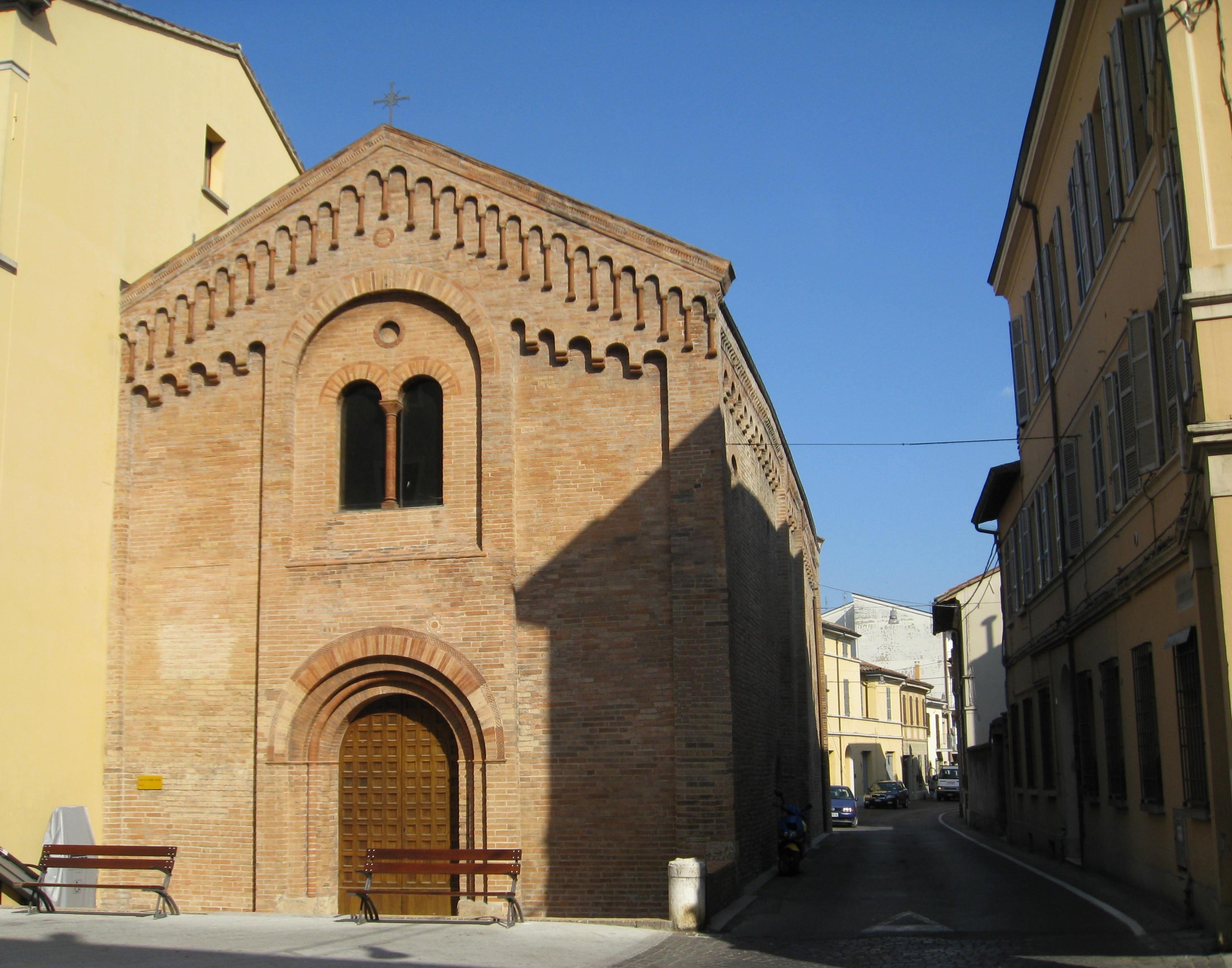 perkele, propria, Chiesa di Sant'Antonio Vecchio a Forlì,libero